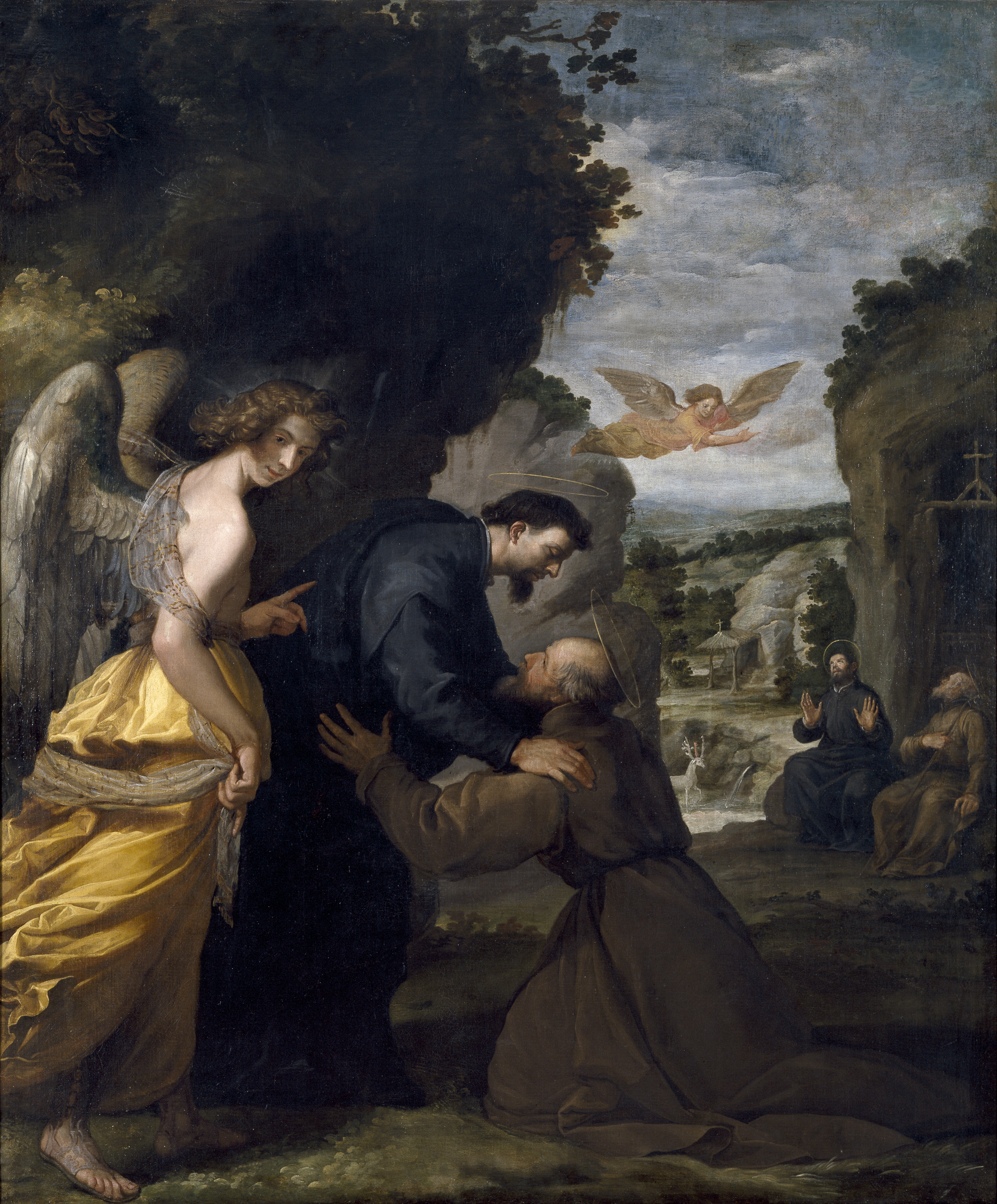 Vicente Carducho Encuentro de san Juan de Mata y san Félix de Valois, Museo del Prado. Óleo sobre lienzo (238 cm x 199 cm)